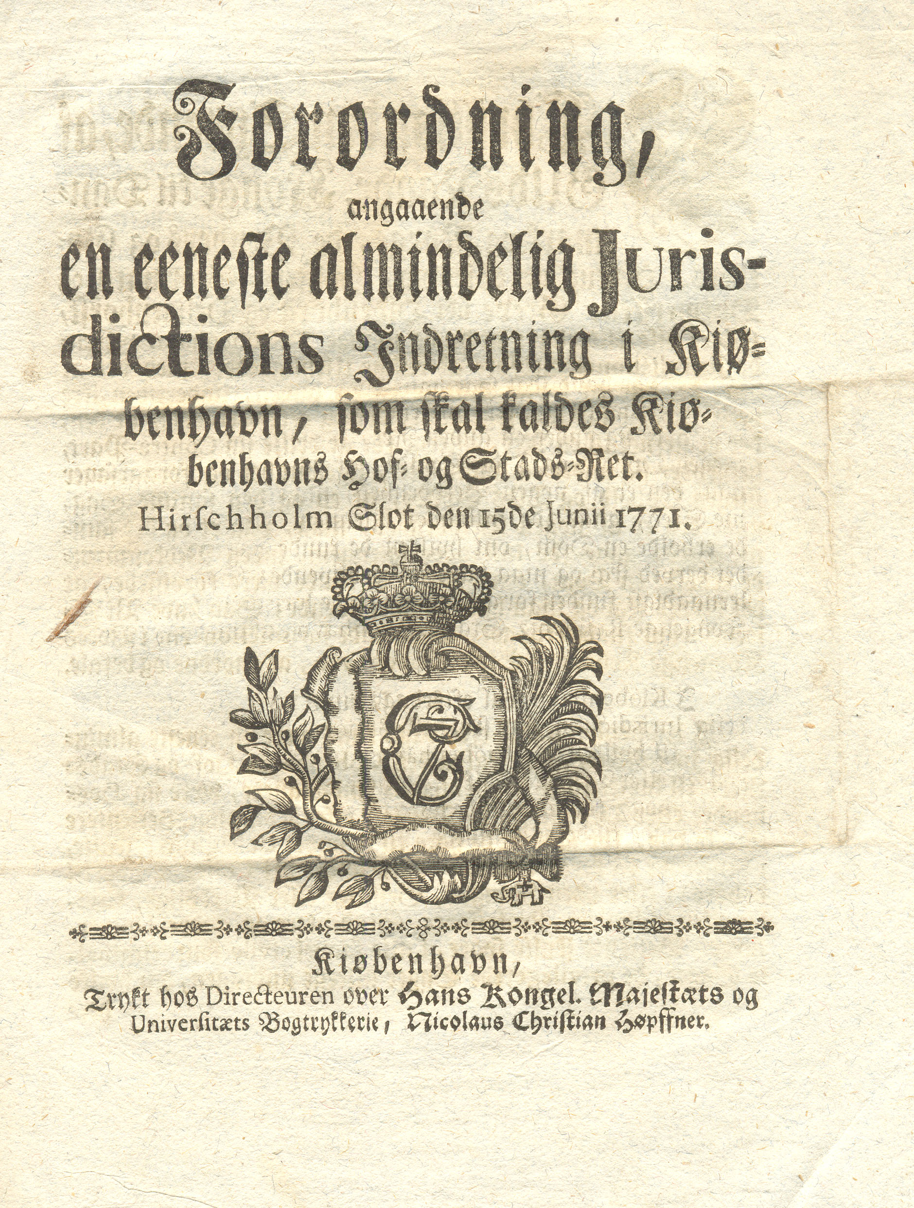 Forordning, angaaende en eeneste almindelig Jurisdictions Indretning i Kiøbenhavn, som skal kaldes Kiøbenhavns Hof- og Stads-Ret. Hirschholm Slot den 15de Junii 1771. Forsiden af den originale forodning indført under Struensees styre.